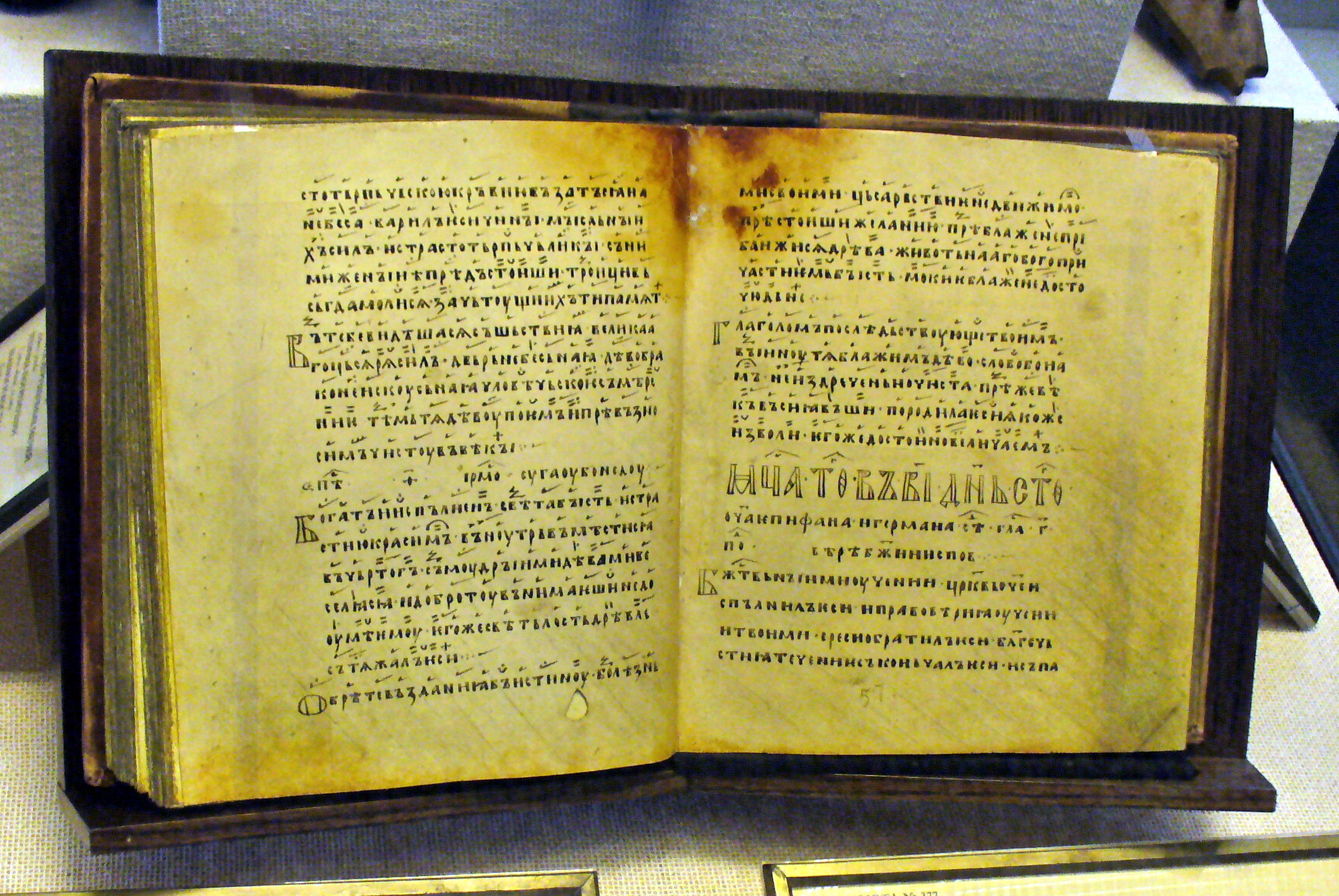 Минея служебная. Церковная книга со службами на май. Текст с нотами. Новгород, Софийский собор. Вторая половина XII века. Пергамент, чернила. Переплёт конца XVIII века.